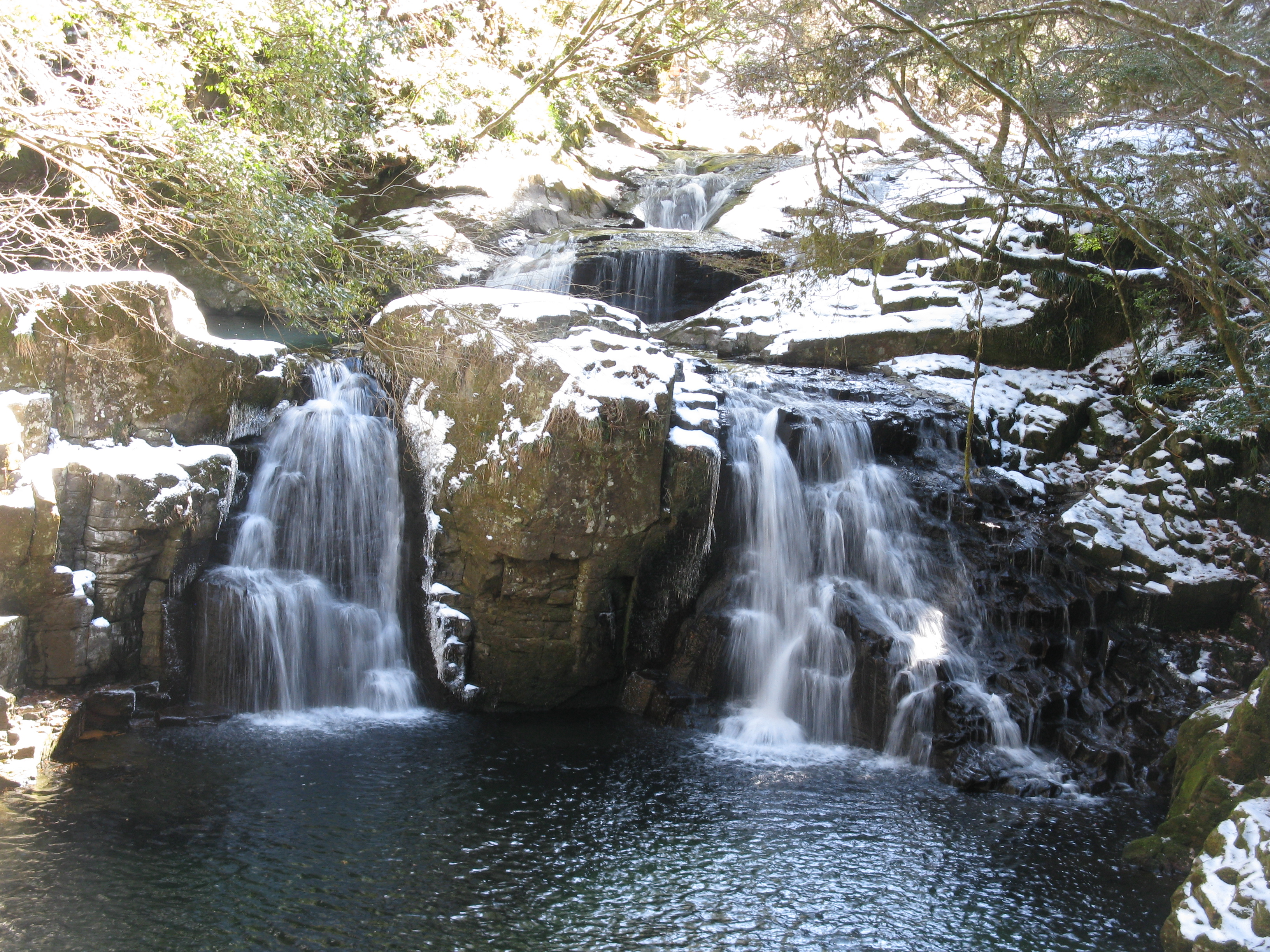 赤目四十八滝の荷担滝